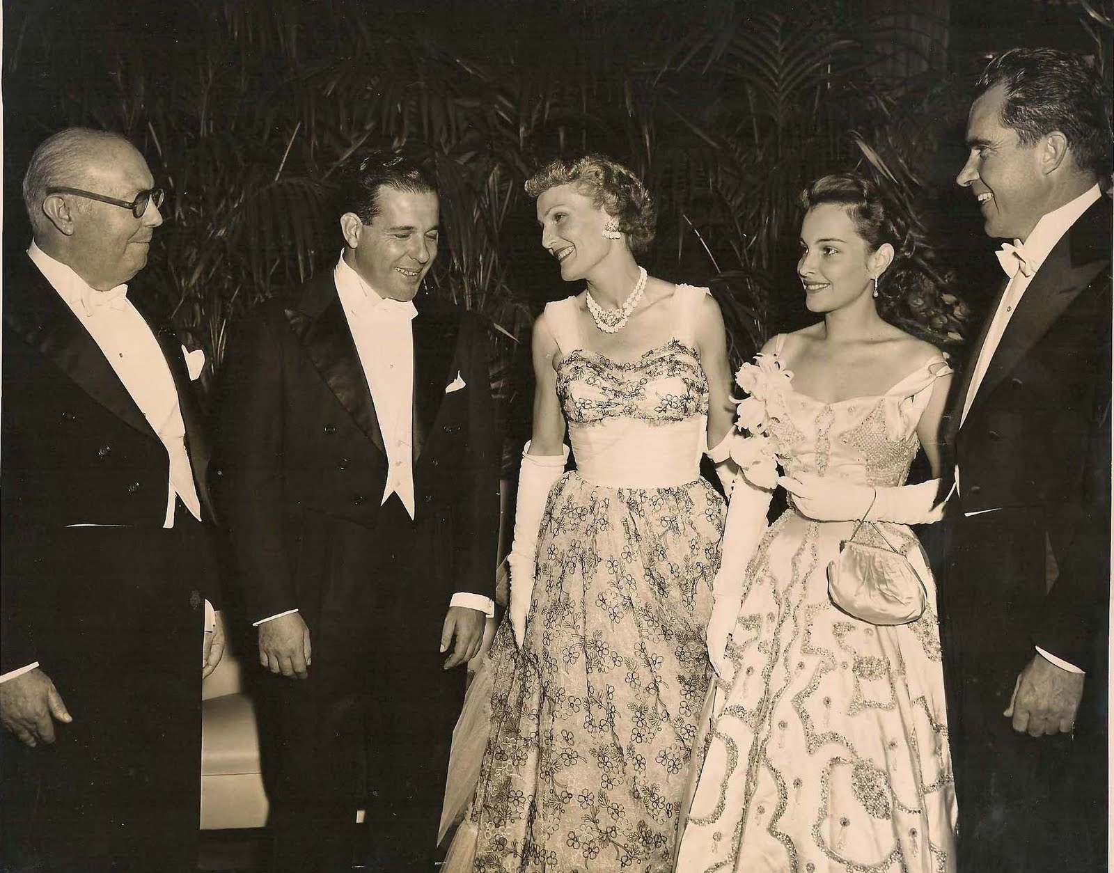 Visita do casal vice-presidencial brasileiro João Goulart e Maria Thereza aos Estados Unidos, em 1956.